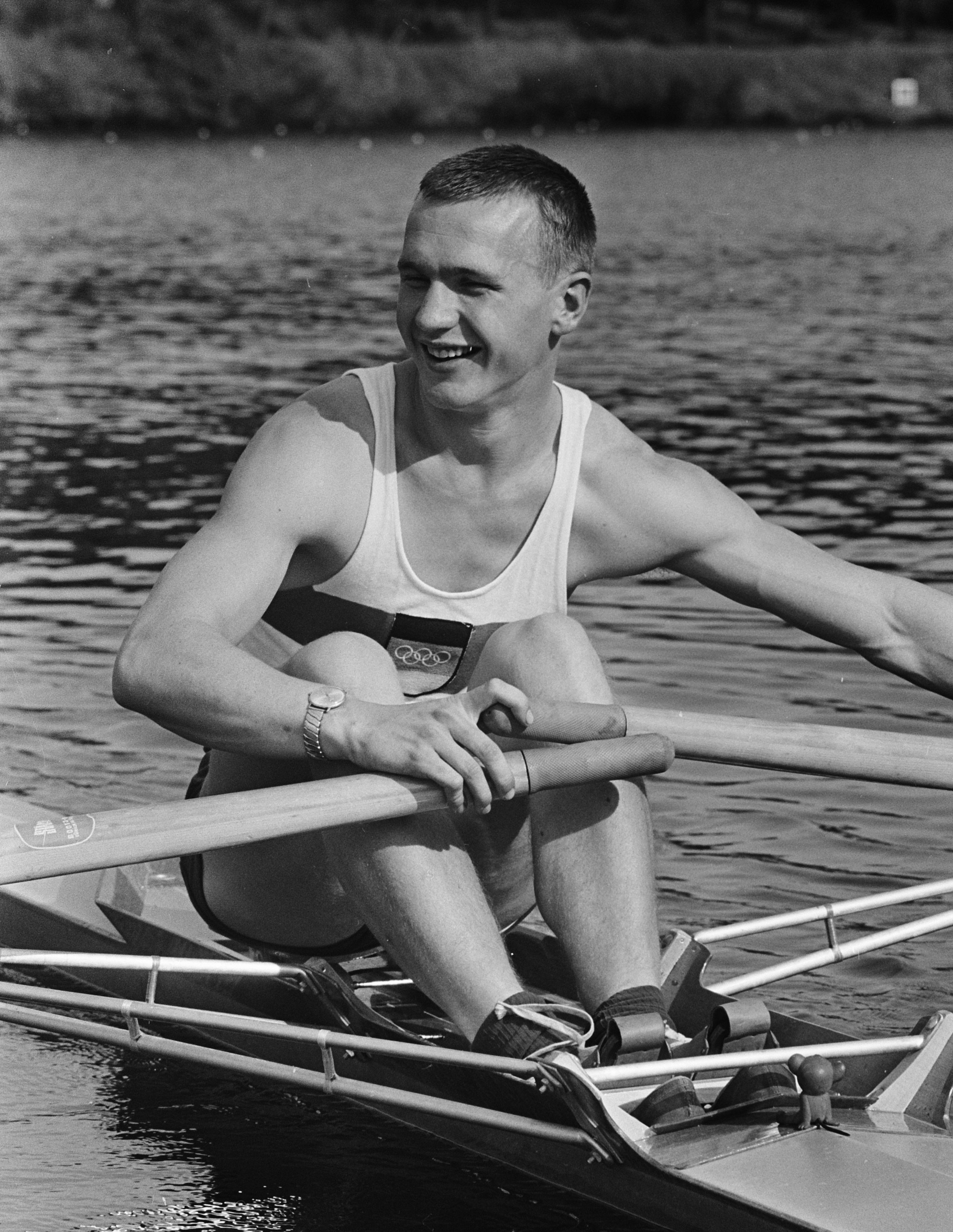 Duitse skiffeur Meibuer